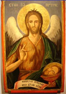 "Свети Йоан Кръстител", икона от църквата "Свети Никола" в Павлешенце